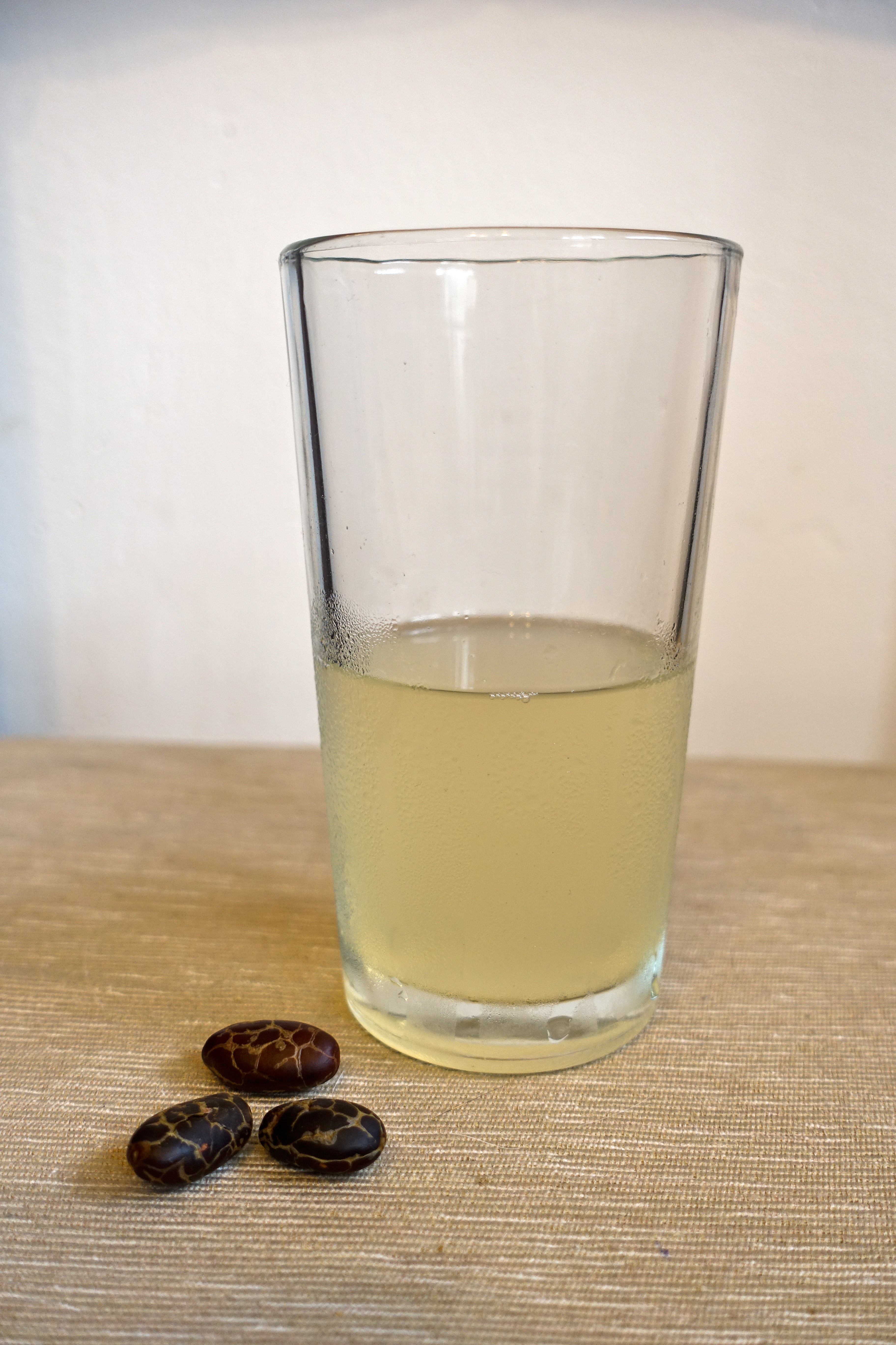 Saft der Kakaofrucht "Suco de cacao" neben gerösteten Kakaobohnen, Provinz Pastaza, Ecuador